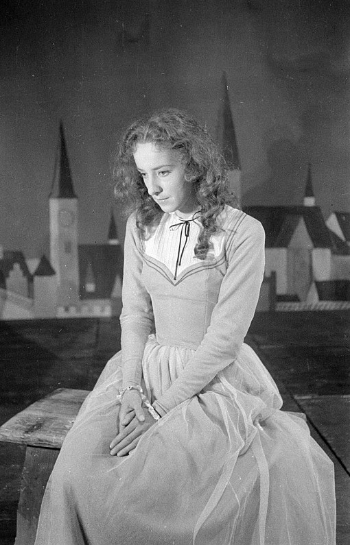 Original image description from the Deutsche FotothekSzenenbilder "Urfaust" mit Otto Eduard Hasse als Mephisto